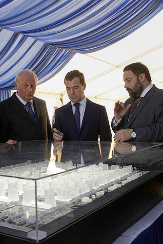 Дмитрий Медведев в Екатеринбурге ознакомился с макетом строящегося района «Академический»